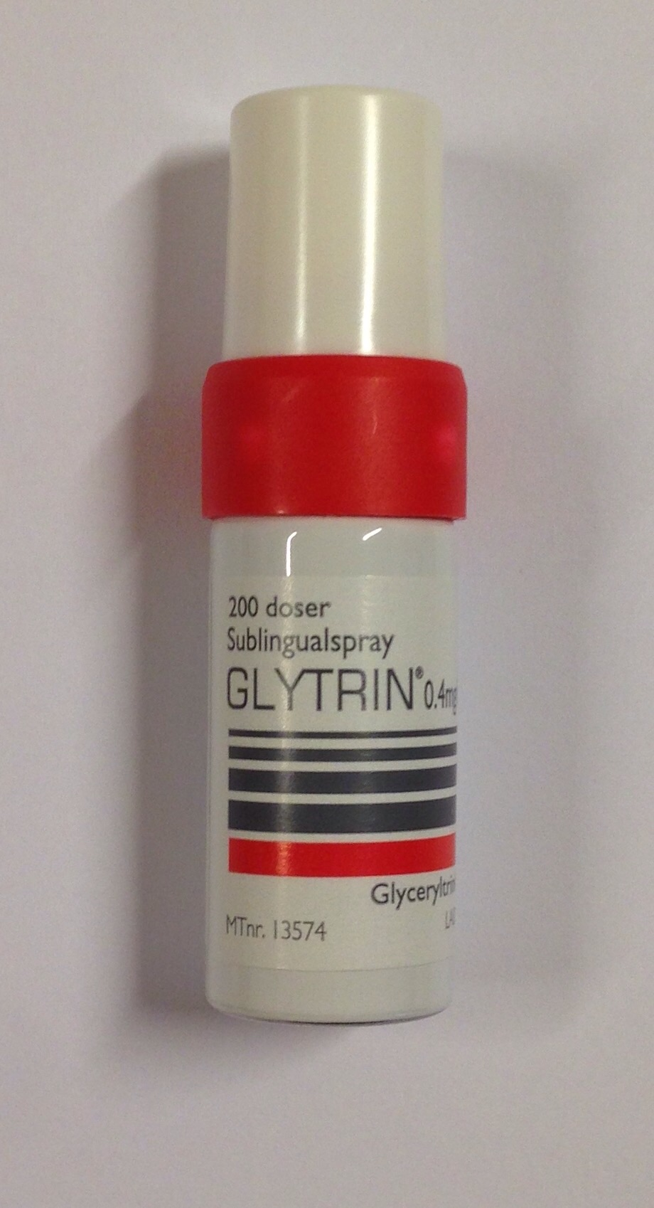 Glytrinspray att använda vid kärlkramp (bröstsmärtor).